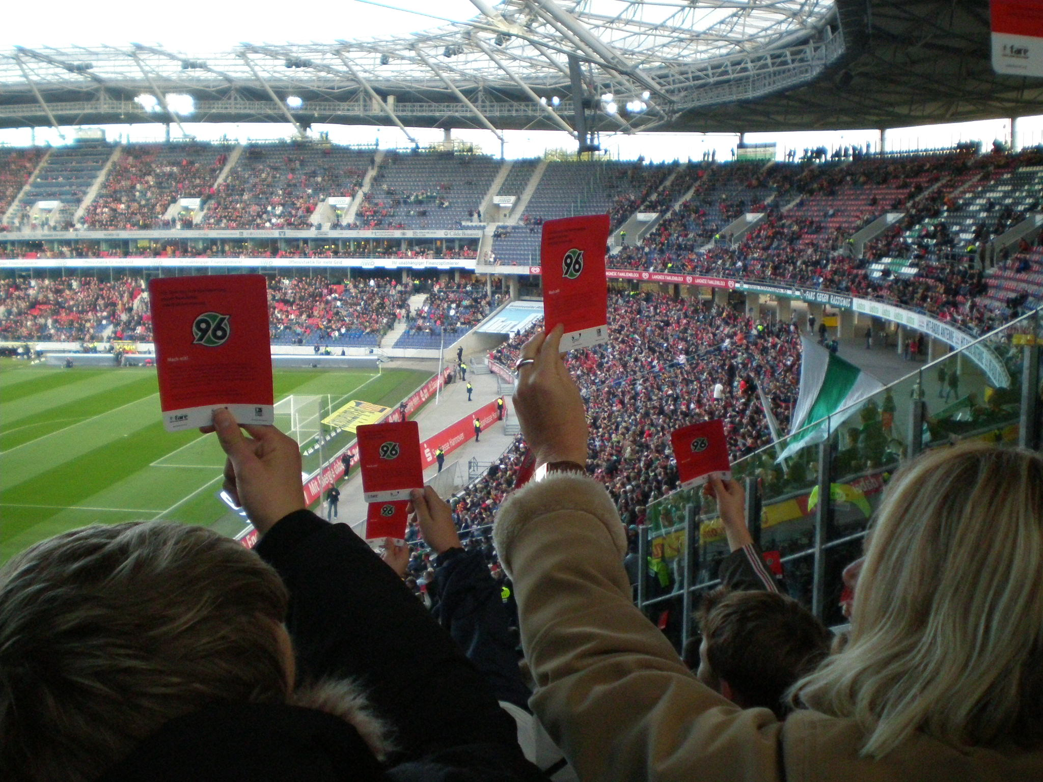 Irkçılığa hayır protestosu. 21.10.2007 tarihli Hannover96 - Wolfsburg maçı öncesi.